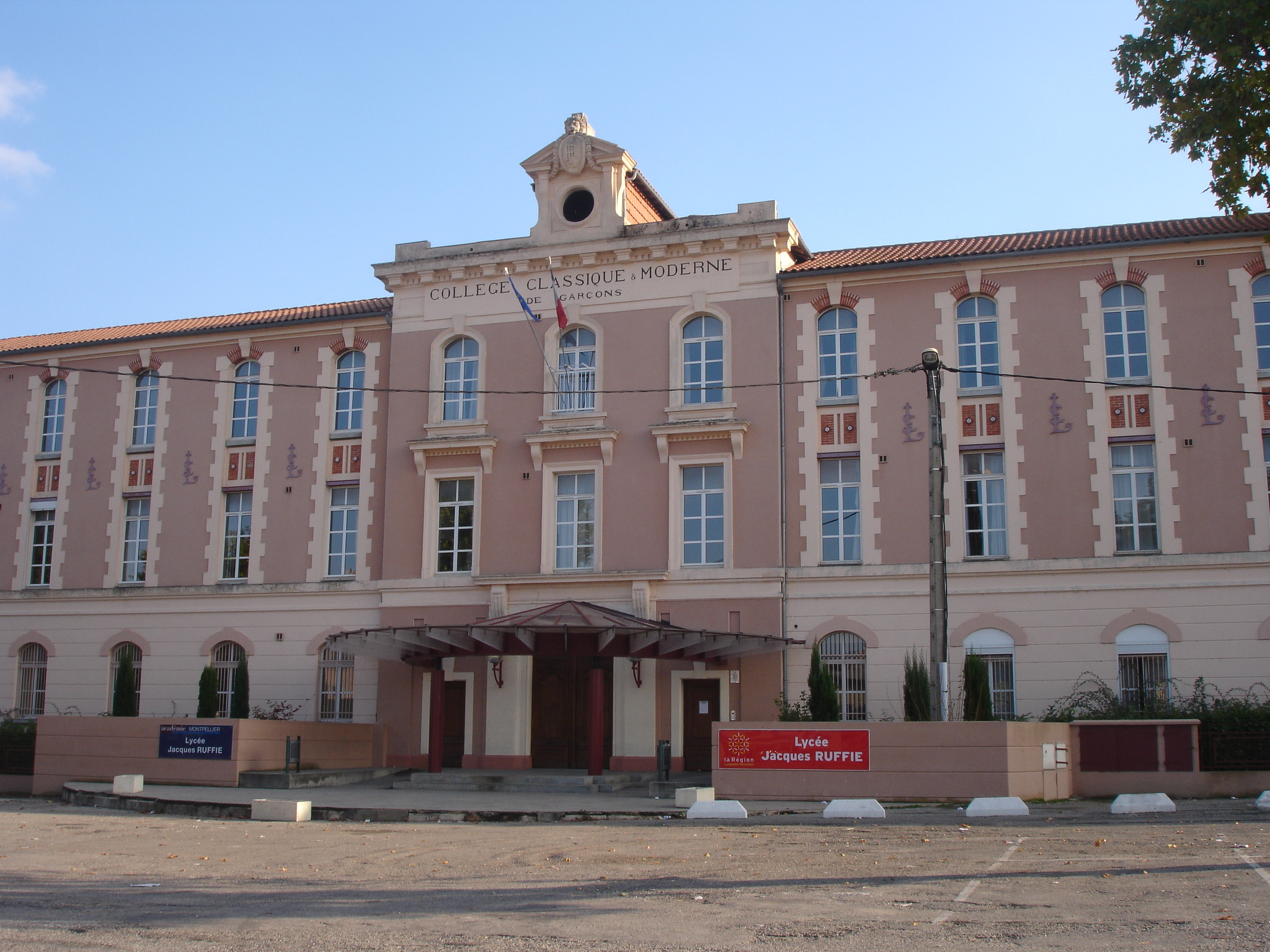 Limoux (Aude, Languedoc-Roussillon, France) - Lycée Jacques Ruffié.